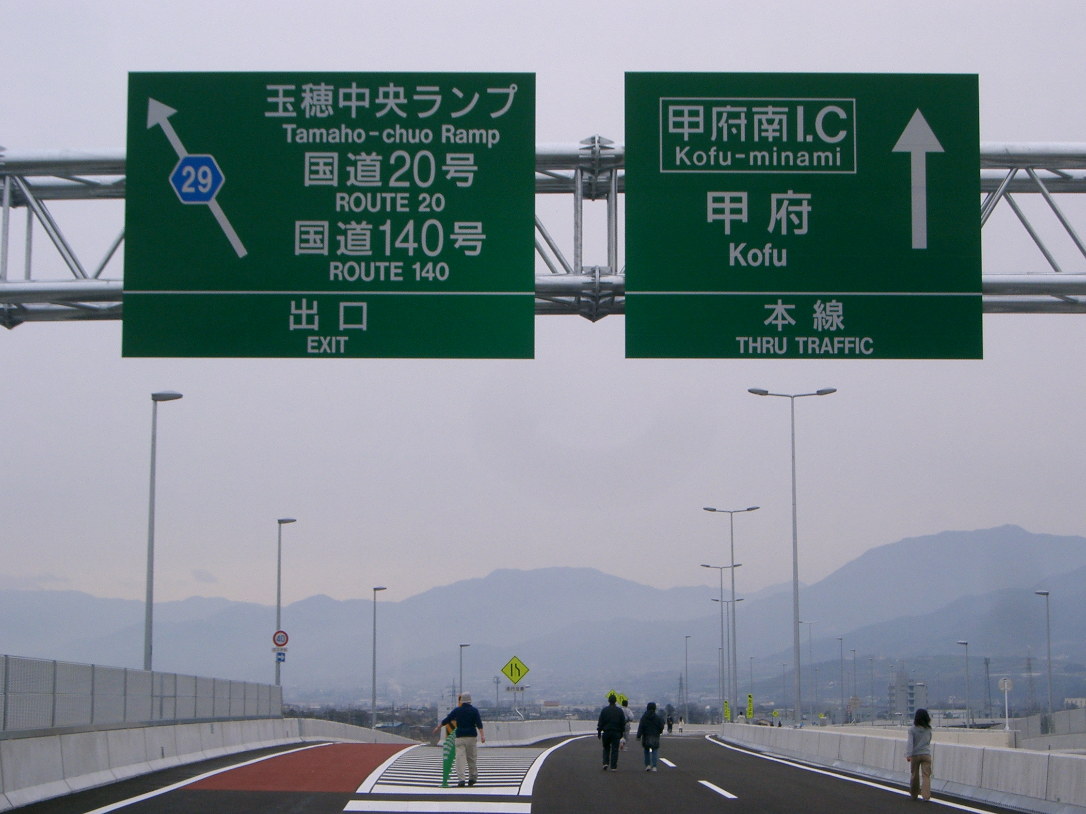 新山梨環状道路南部区間 内廻り玉穂中央ランプ